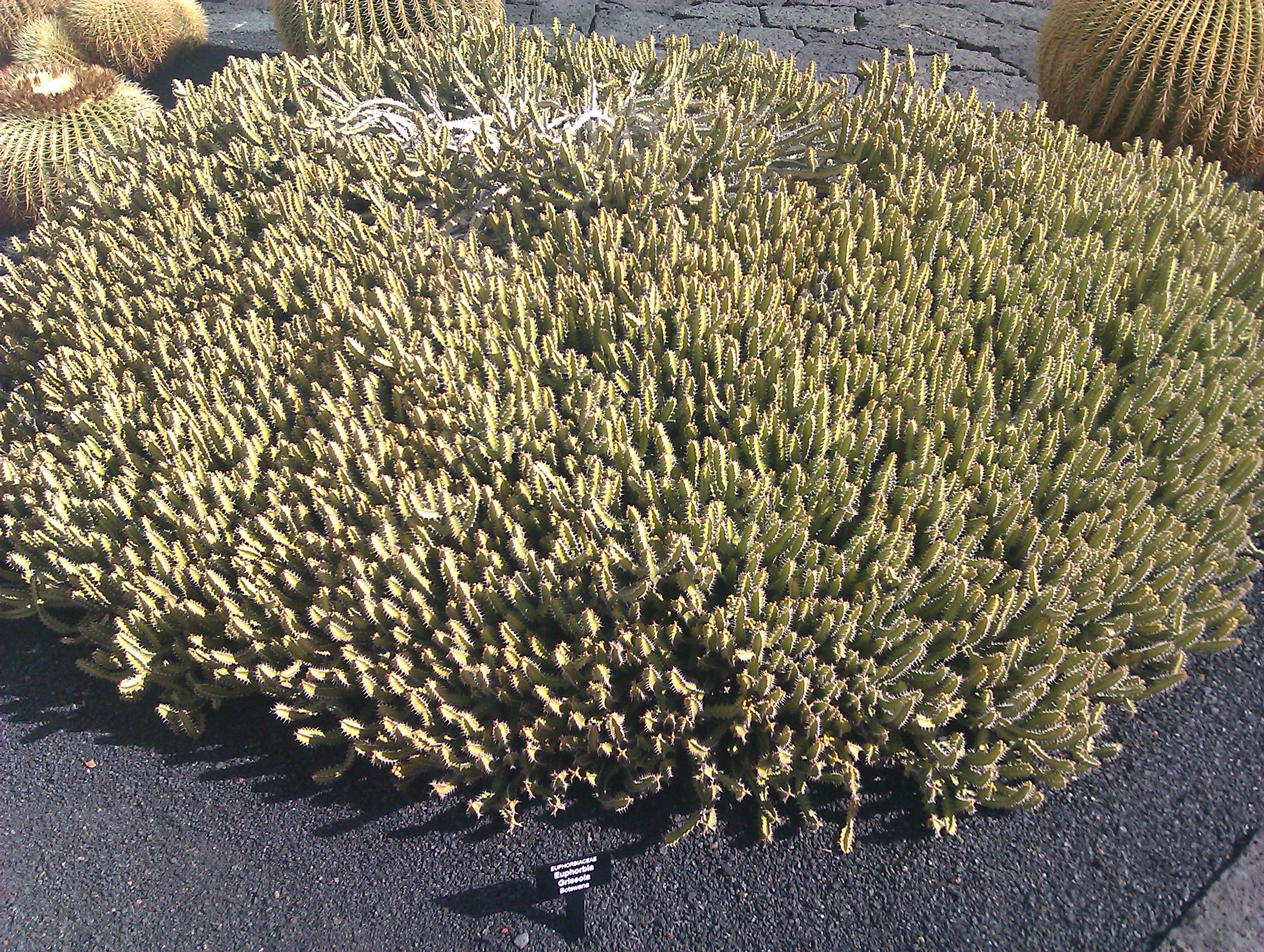 Euphorbia griseola. Photo taken at Jardín de Cactus, Lanzarote, Spain.